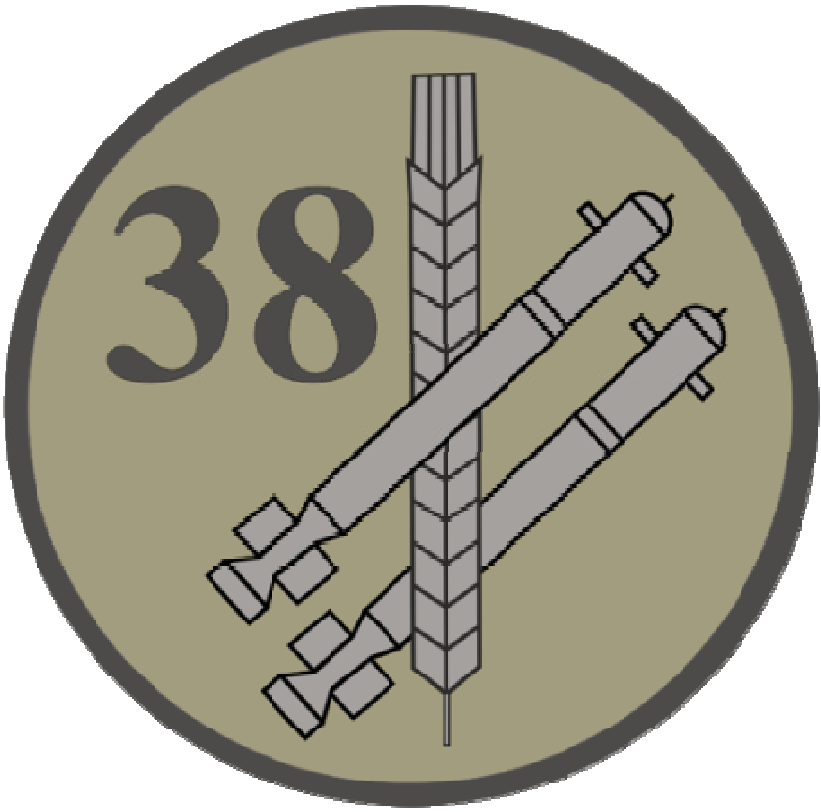 Oznaka rozpoznawcza na mundur polowy 38 dzab OP